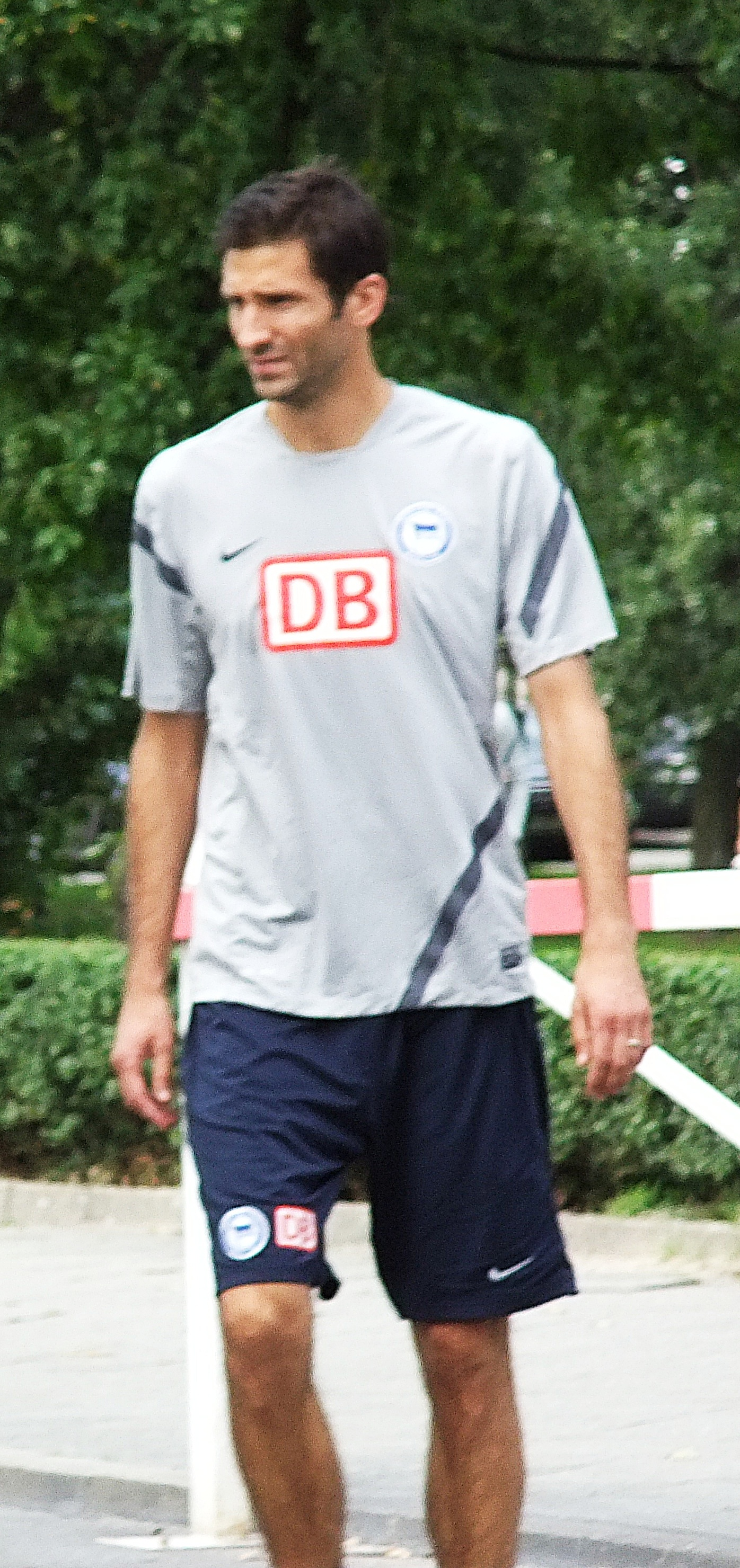 Andre Mijatović, 2011